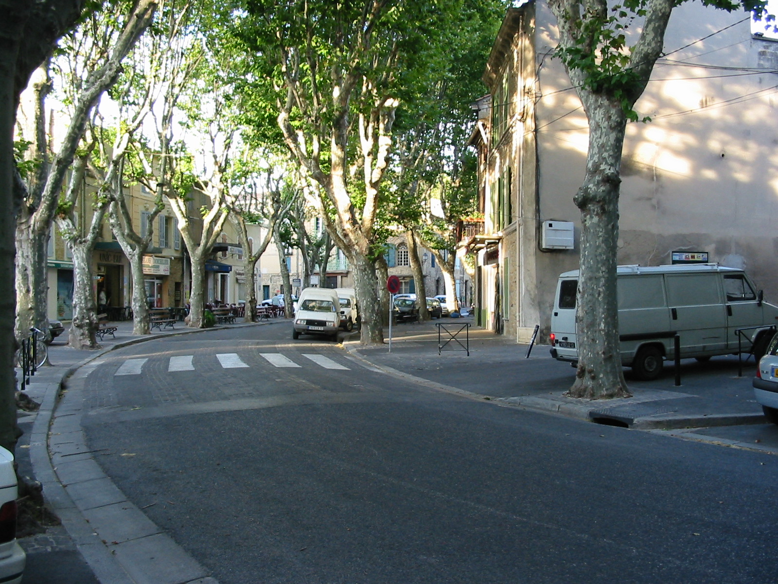 Boulevard principal de Grans